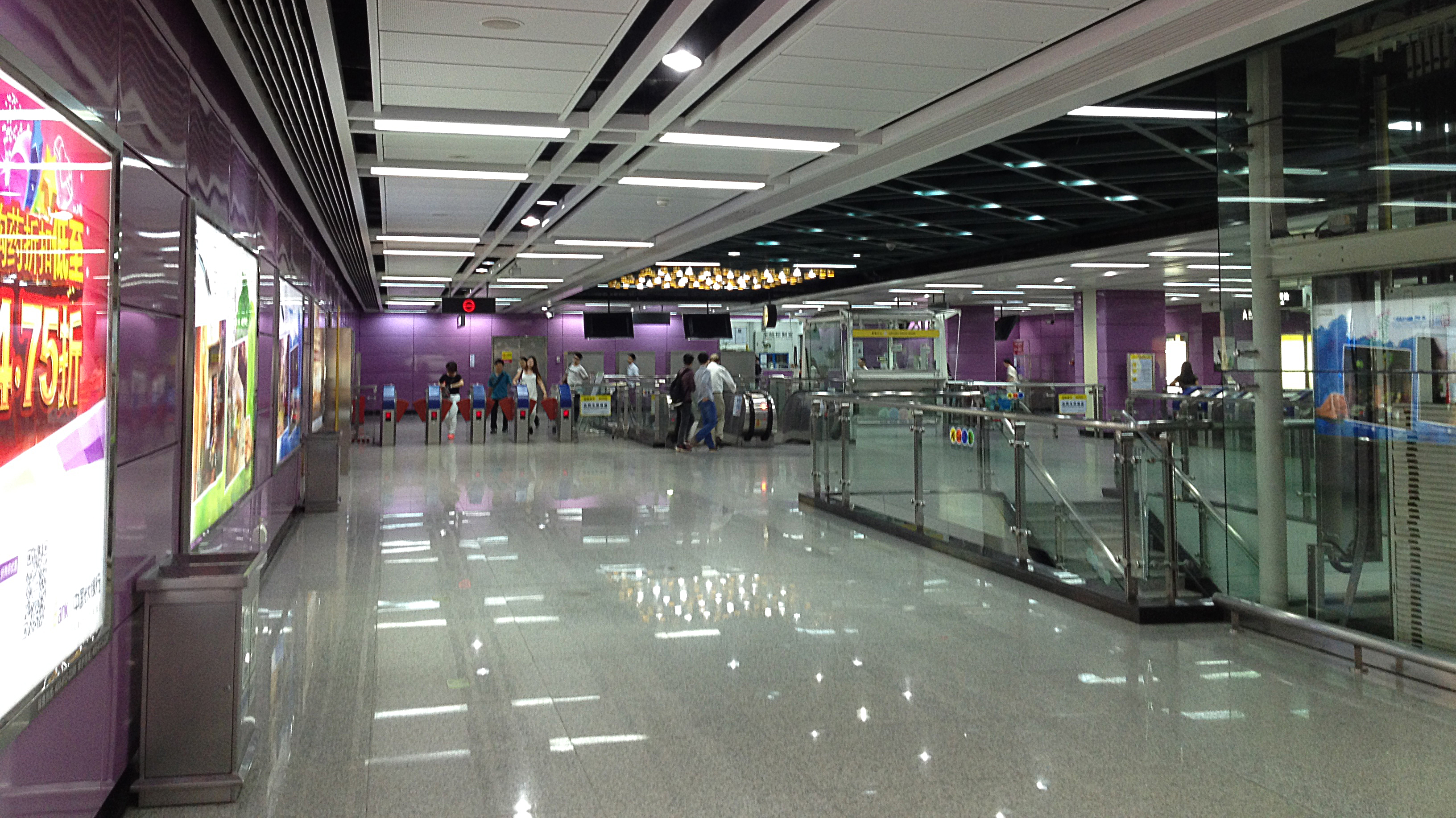 广州地铁五山站站厅